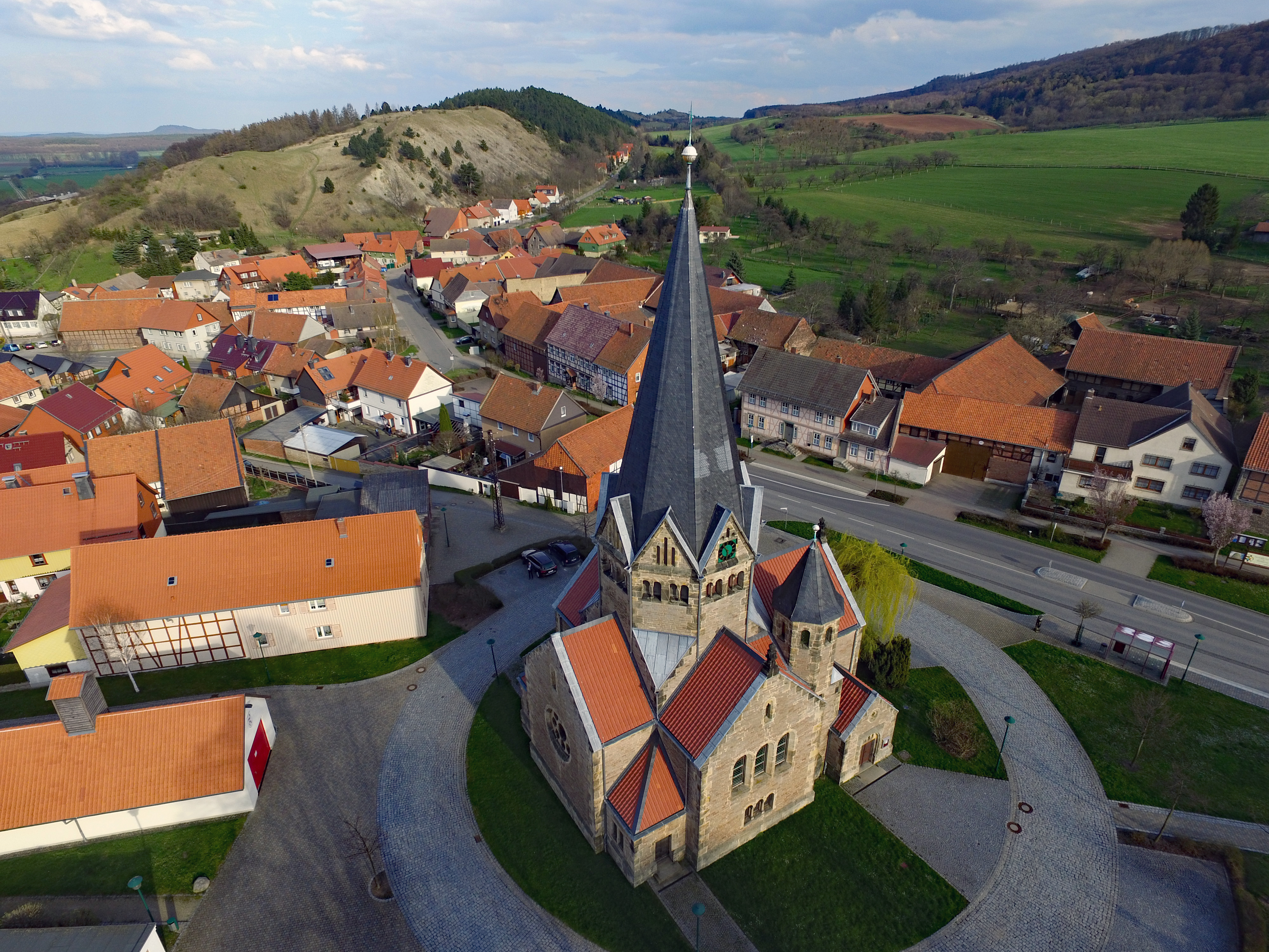 Dorfkirche Benzingerode